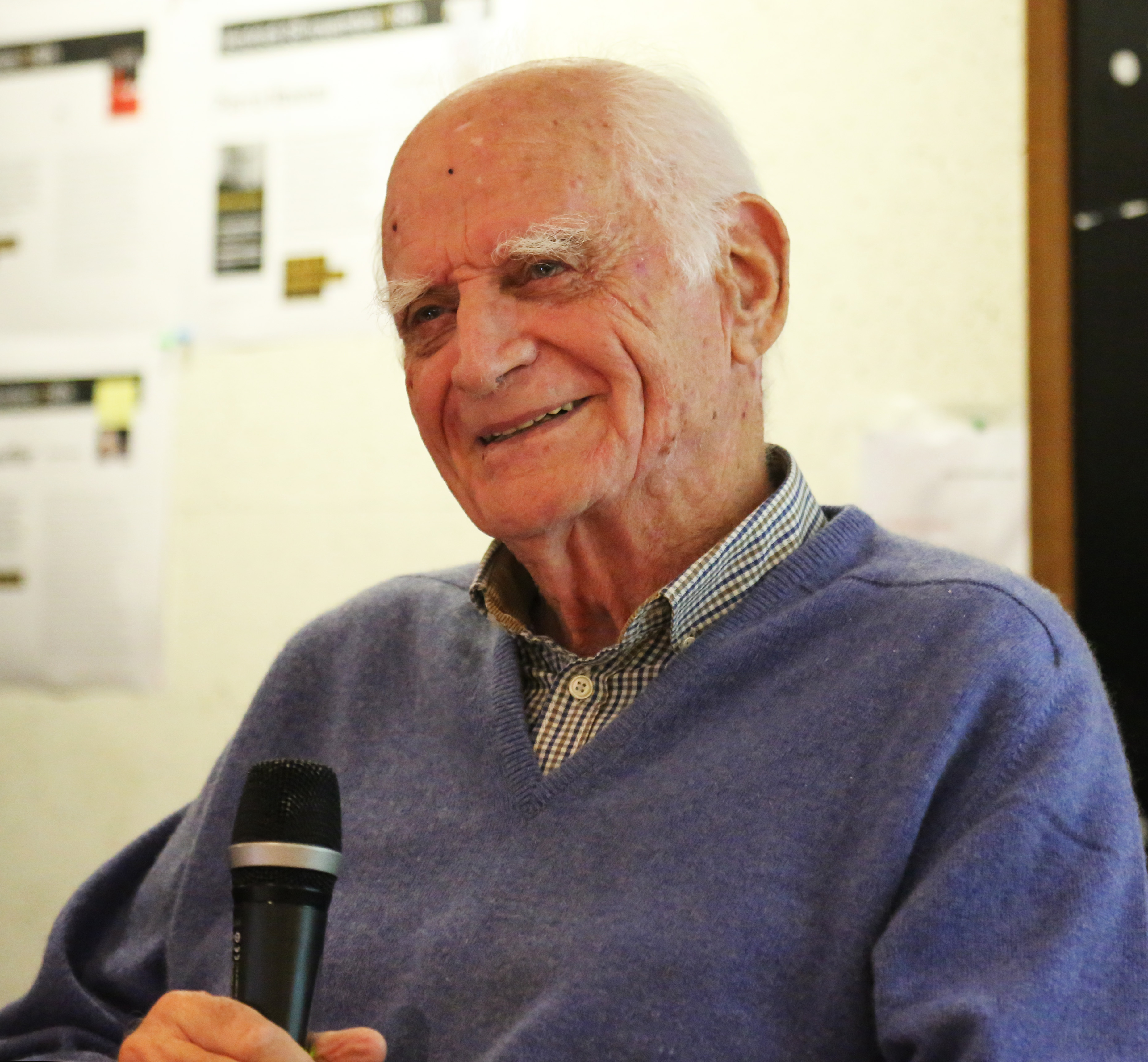 Michel Serres à la librairie Dialogues à Brest, Finistère, le 30 octobre 2014